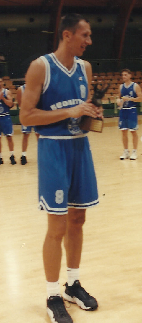 Košarkaš Ljubiša Luković u dresu Beopetrola iz Beograda 1998. godine